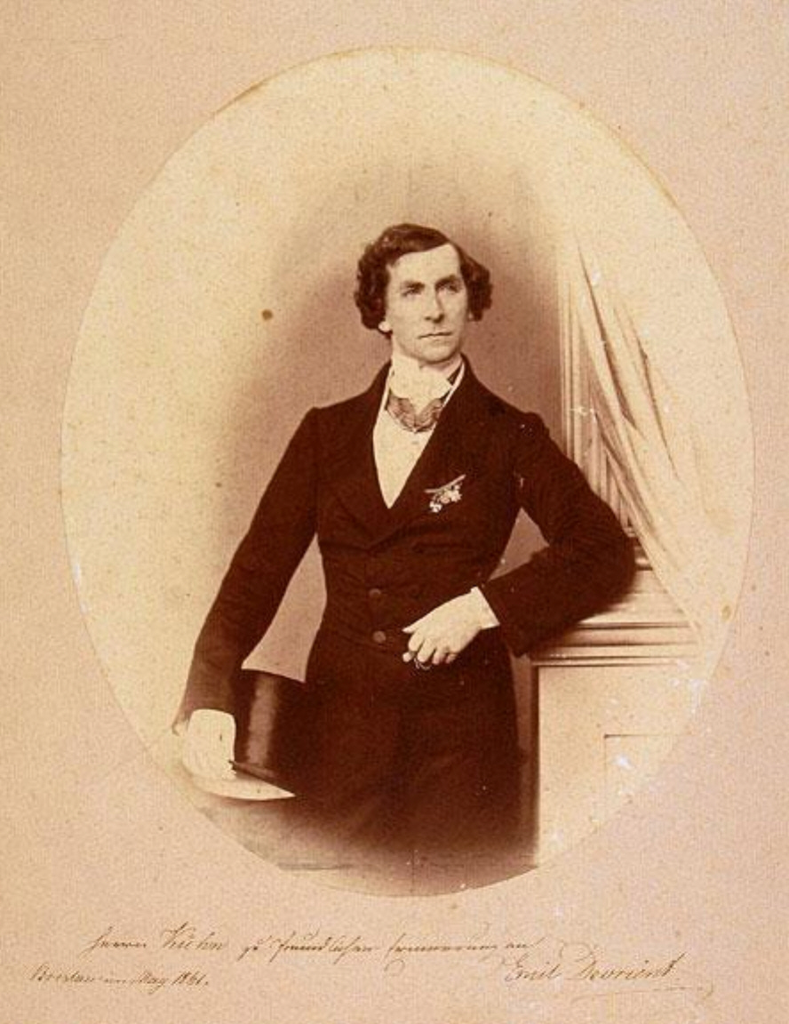 Gustav Emil Devrient (* 4. September 1803; † 7. August 1872), deutscher Schauspieler. Handschriftlicher Text unterhalb des Fotos: Herrn Kühn zu freundlicher Erinnerung an Emil Devrient. Breslau im May 1861.